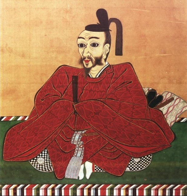 中川久清の肖像。